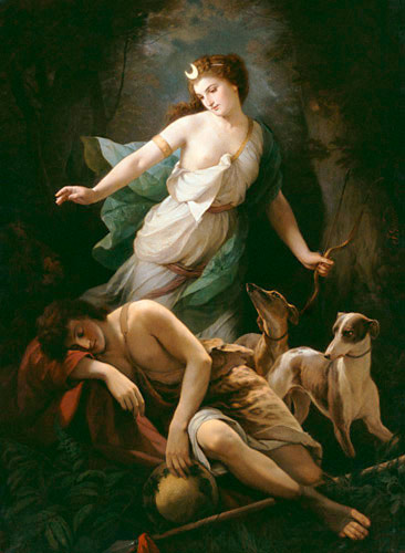 164 × 222 cm